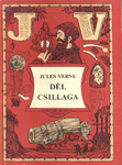 A Jules Verne által 1884-ben megírt Dél csillaga című könyv egyik első magyar kiadásának borítója, mely Szecskó Tamás munkája.